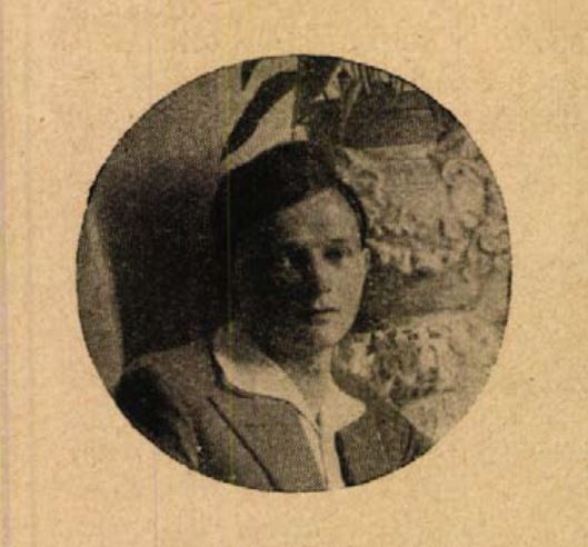 A kép megjelent a Színházi Élet - 1930/25. számában, amikor Staibl Miklós az Arco-i Kurkomission amatőr-sakkversenyén első díjat nyert.